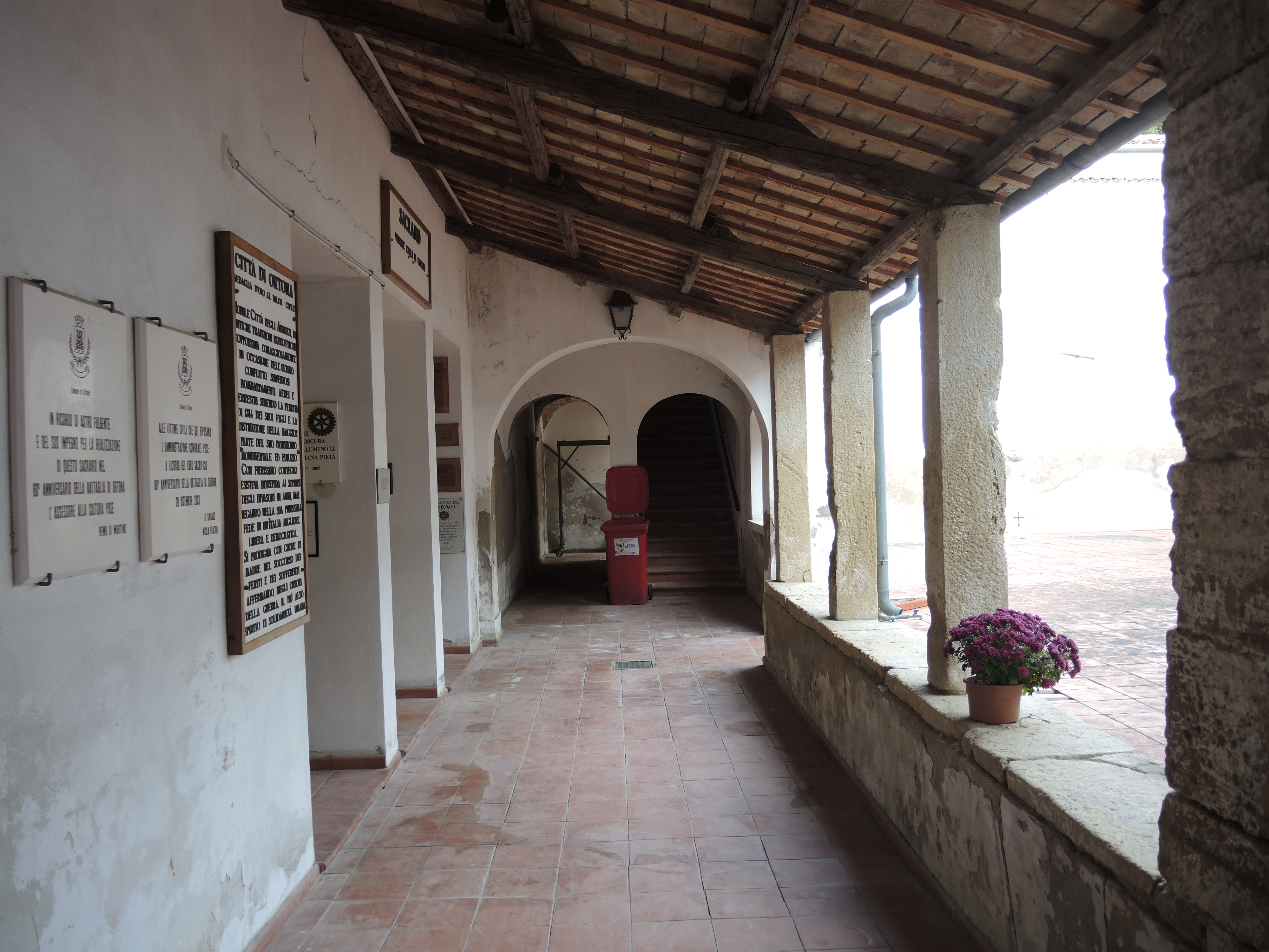 Ortona: Chiesa della Santissima Trinità